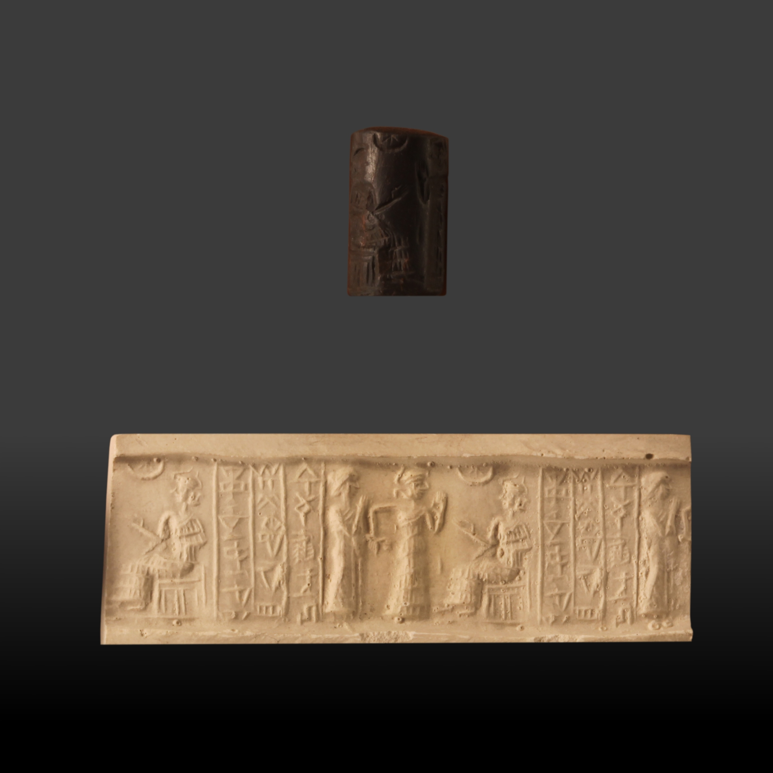 Seal: Presentation scene